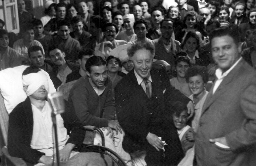 ארתור רובינשטיין בביקורו בתל השומר לבקר את החיילים הפצועים